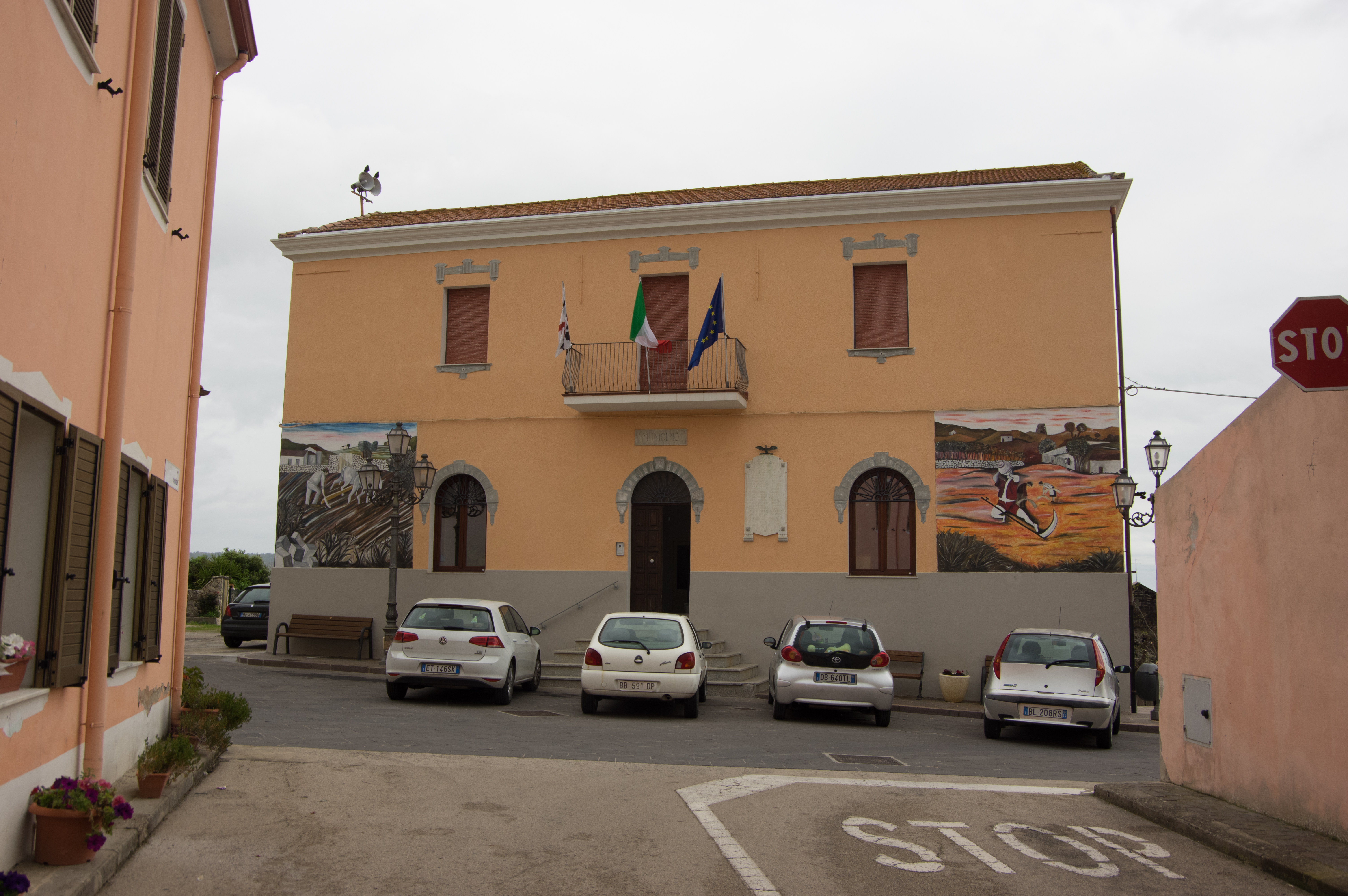 Ardana in Sardinien. Das Rathaus (municipio) in Ardana.